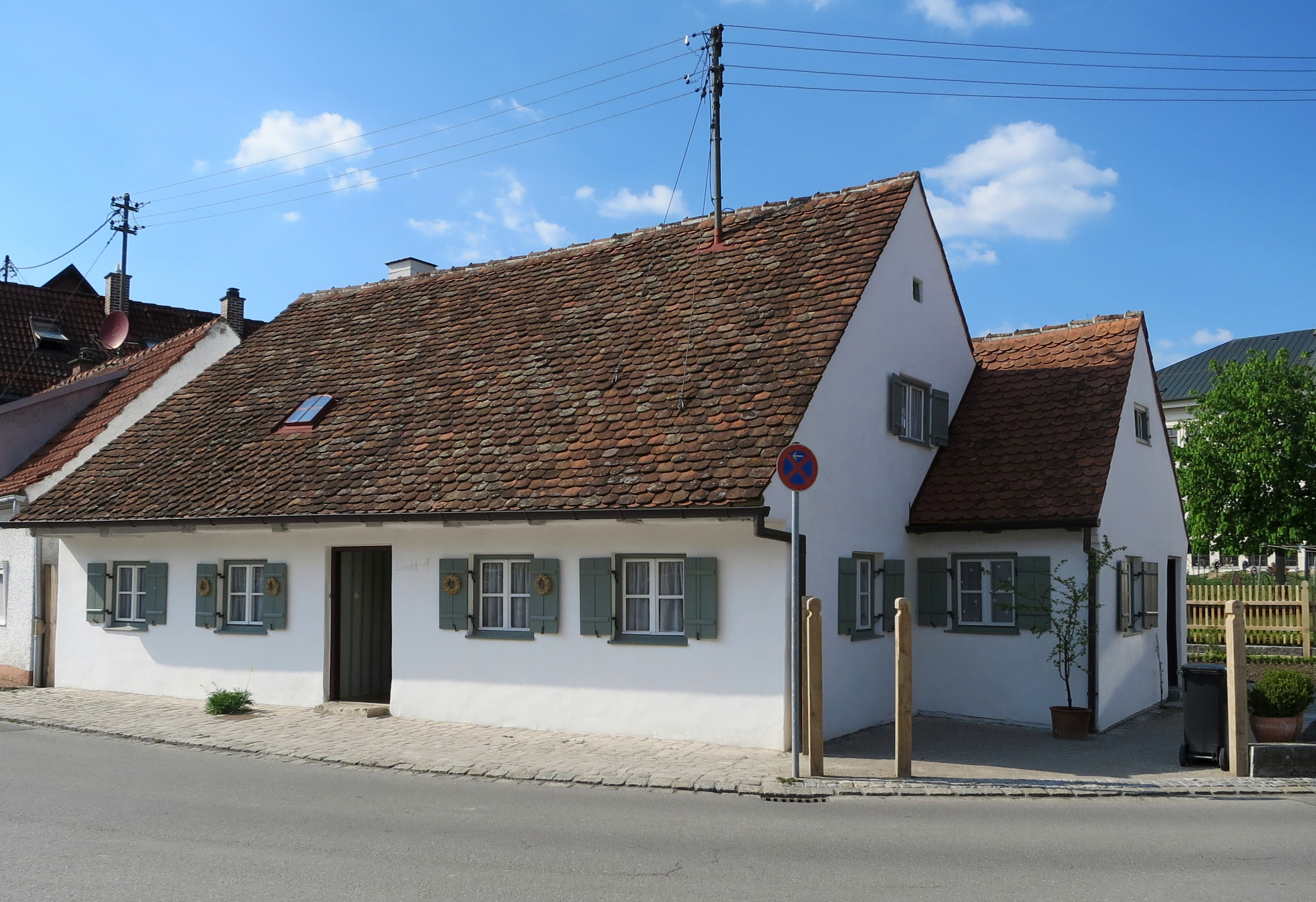 Das Weberhäusl in Pfaffenhofen an der Ilm bekommt gerade einen neuen Zaun. Es ist ein gesdhütztes Baudenkmal mit der Nr. D-1-86-143-8.